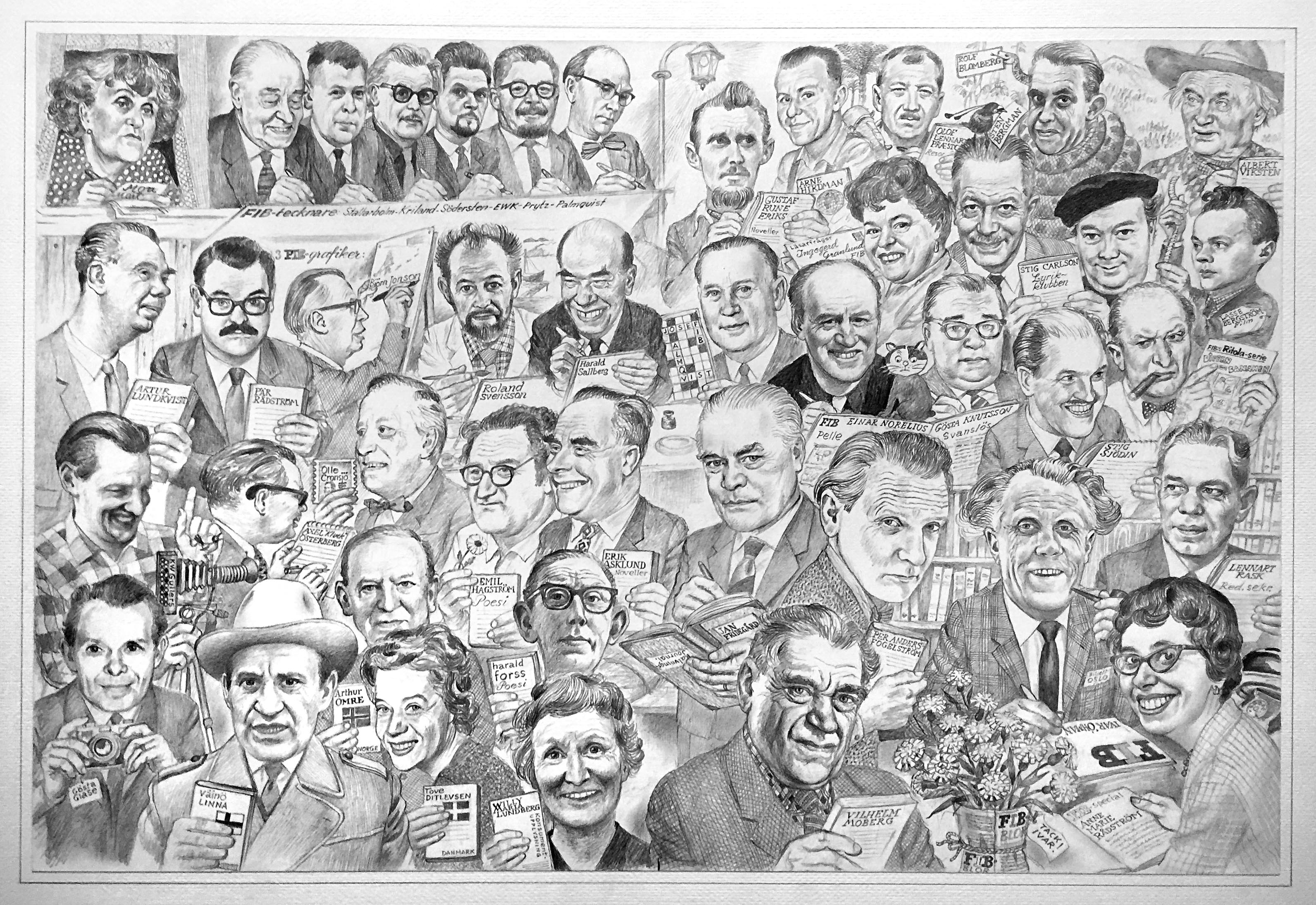 Folket i Bild. FIBs medarbetare 1962, varav 5 tillhör den fasta redaktionen.